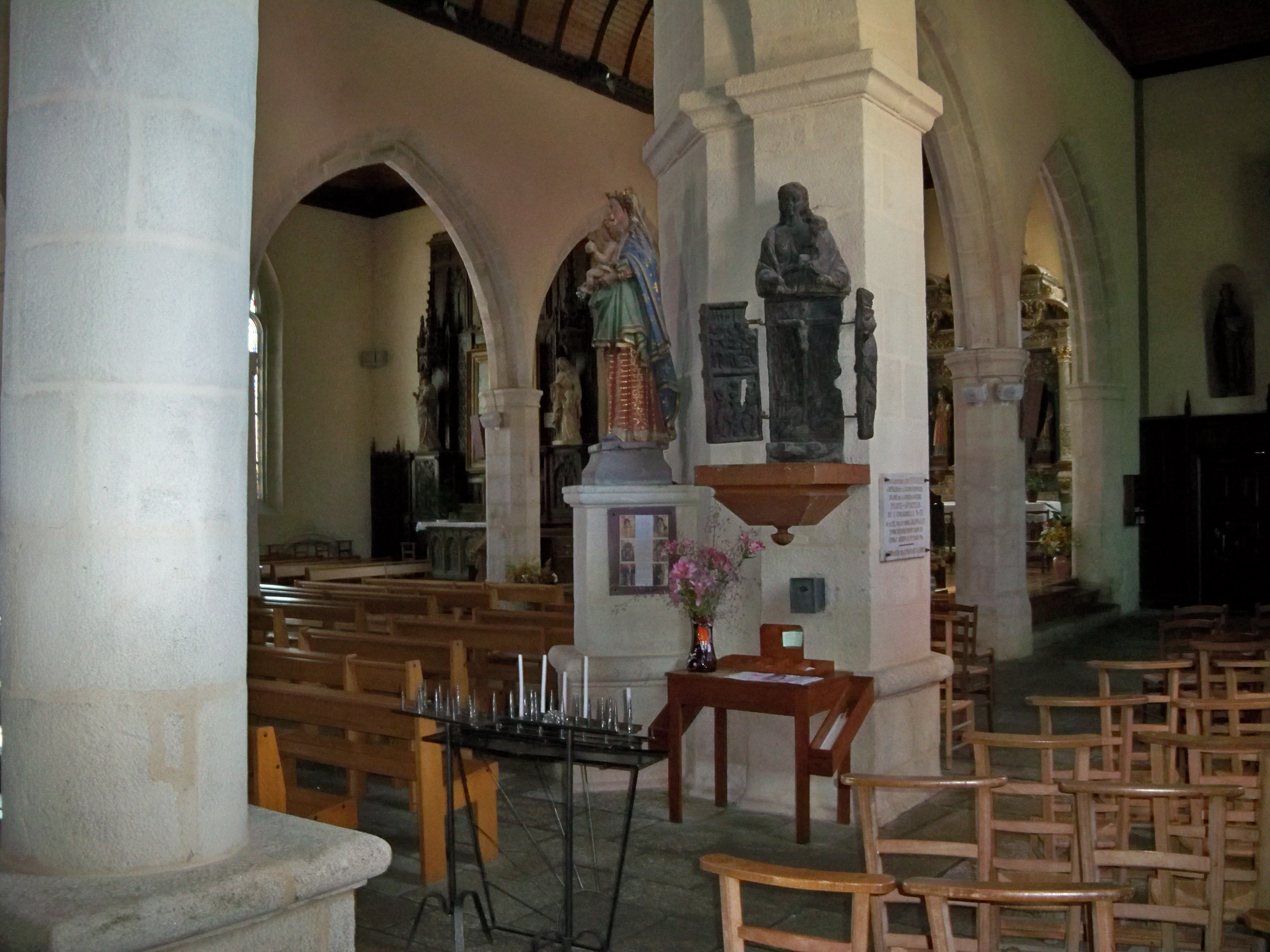 L'intérieur de léglise paroissiale de Bannalec, Notre-Dame-de-Folgoët